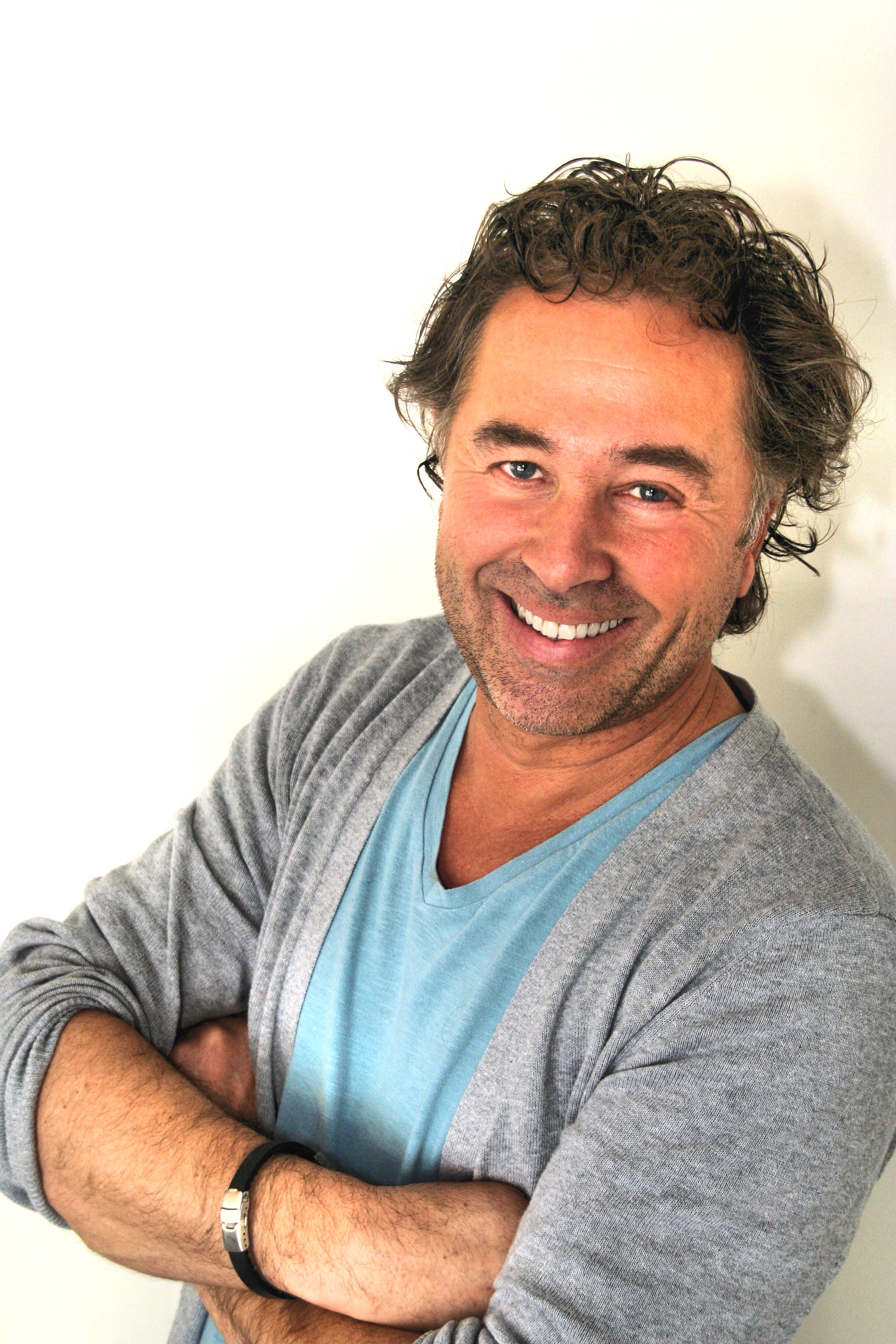 Deze foto is genomen ter gelegenheid van de theatervoorstelling 'Onverwachts'.